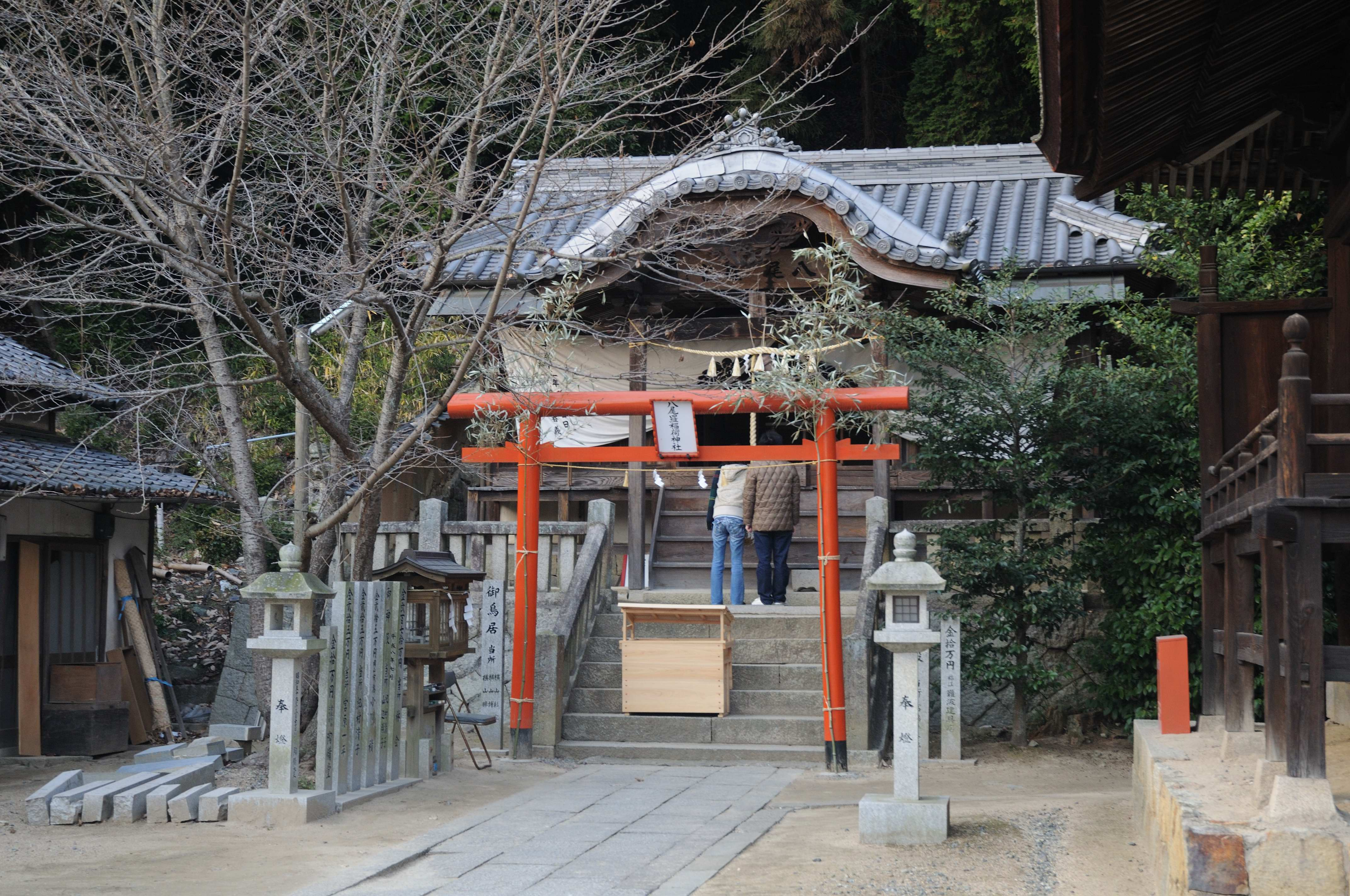 Happira-gu